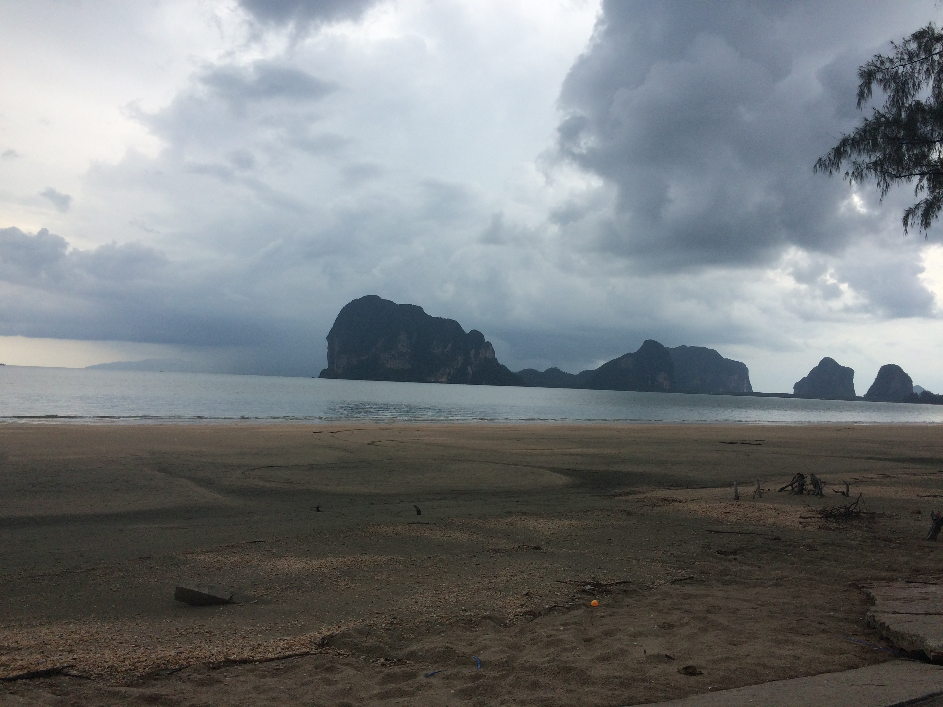 Mai Fat, Sikao District, Trang, Thailand